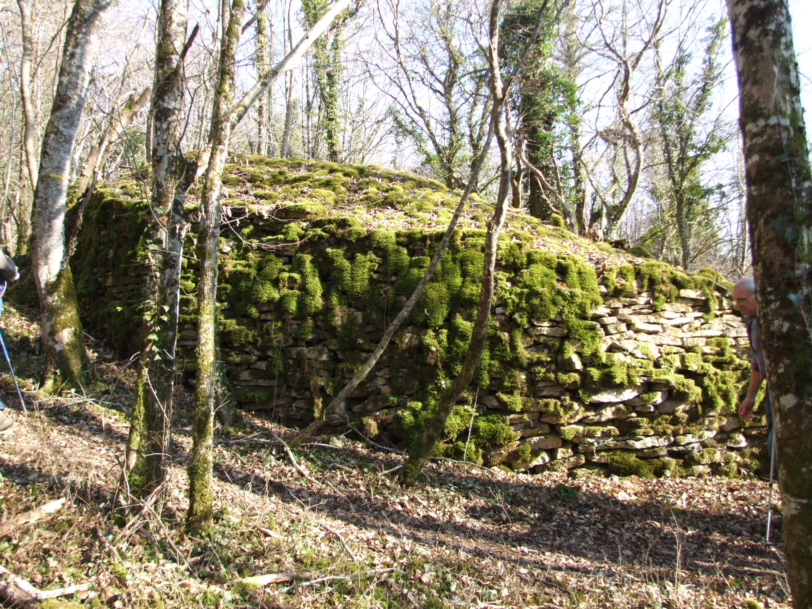 Tumulus, Barbirey-sur-Ouche, Côte-d'Or, Bourgogne, FRANCE